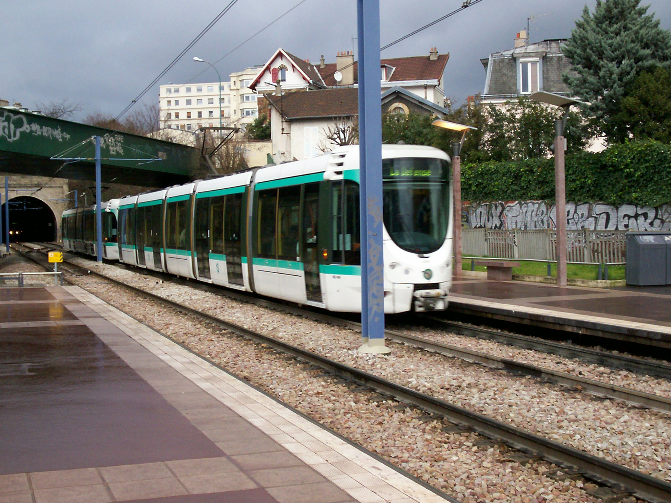 T2 à Suresnes Longchamp